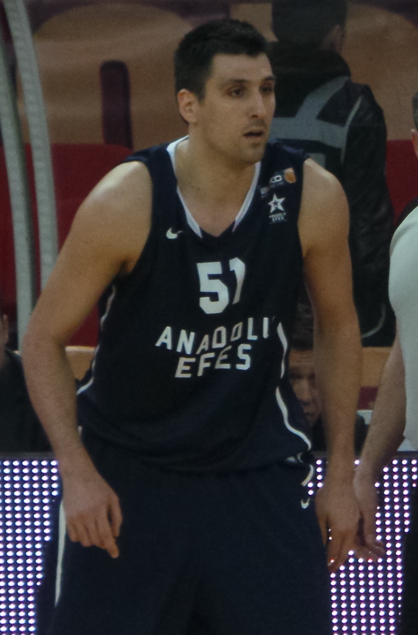 Milko Bjelica